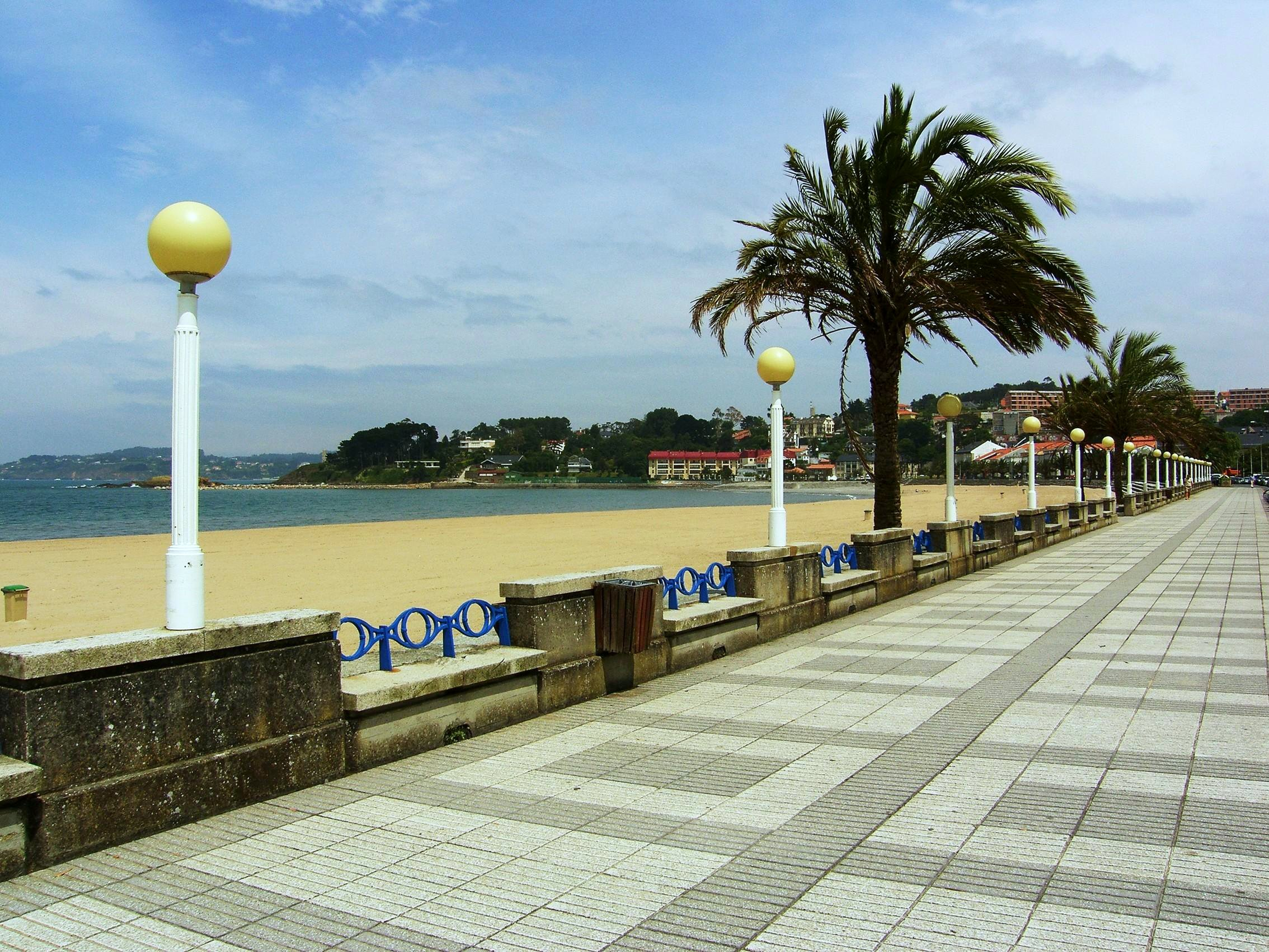 Paseo marítimo de Santa Cristina (Oleiros, Galiza).